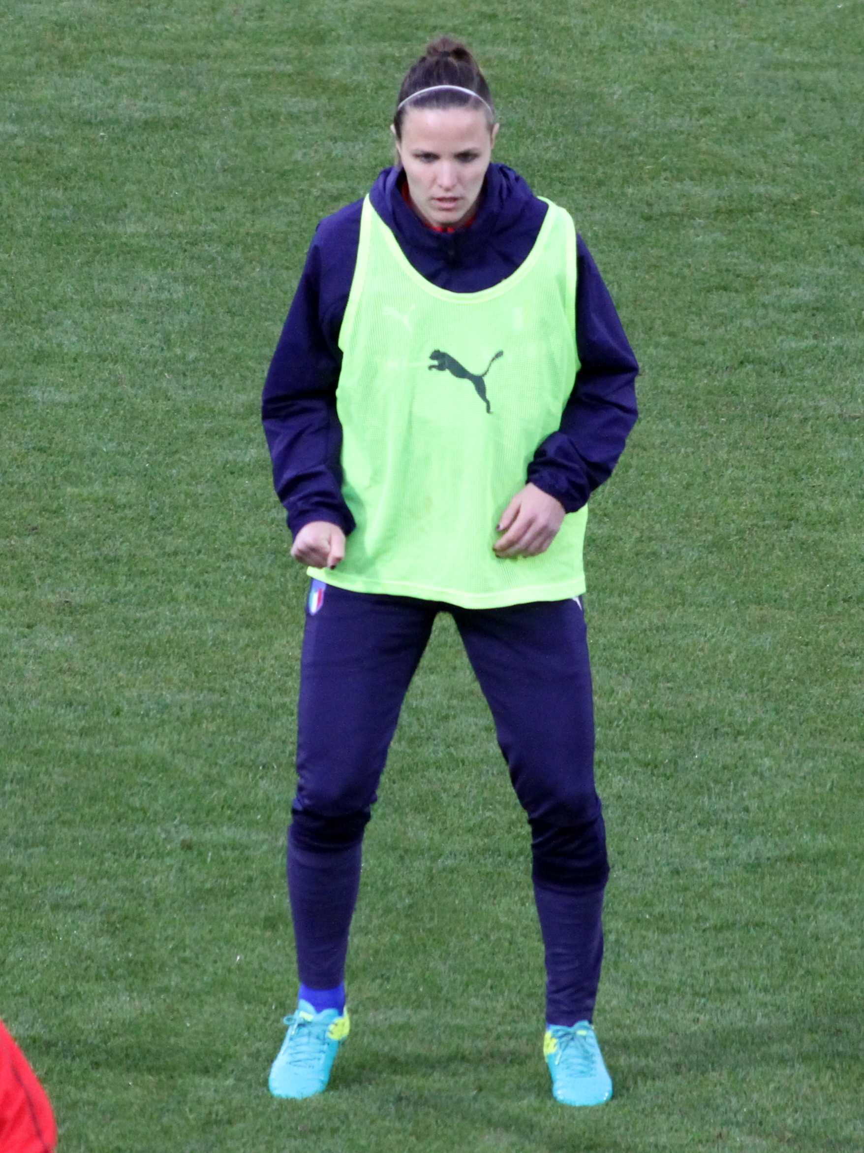 Lisa Alborghetti, centrocampista della nazionale di calcio femminile dell'Italia, durante il riscaldamento tra i due tempi dell'incontro Italia-Belgio del 10 aprile 2018 allo stadio Paolo Mazza di Ferrara.